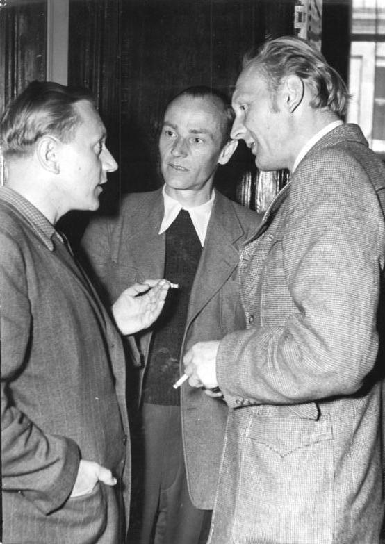 Zentralbild Köhler 7.5.52 Arbeitstagung des Deutschen Schriftstellerverbandes über das Kinder- und Jugendbuch. Am 7. Mai 1952 fand im Klub der Kulturschaffenden in Berlin eine Tagung des Deutschen Schriftstellerverbandes statt. Thema der Tagung war das Kinder- und Jugendbuch. Stalinfriedenspreisträgerin Anna Seghers leitete die Arbeitstagung ein, auf der 200 Schriftsteller aus der DDR anwesend waren. UBz: Kurz vor Beginn der Tagung. Vlnr: Herbert Kaptor vom Jugendliteraturstudio der Bücherstube Gutenberg, Leipzig, Schriftsteller Fritz Buchmann, Verfasser des Kinderbuches "Boje 4 und ihr Geheimnis" und der sorbische Schriftsteller Jurij Brezan, Verfasser des Buches "Wie ich mein Vaterland fand"